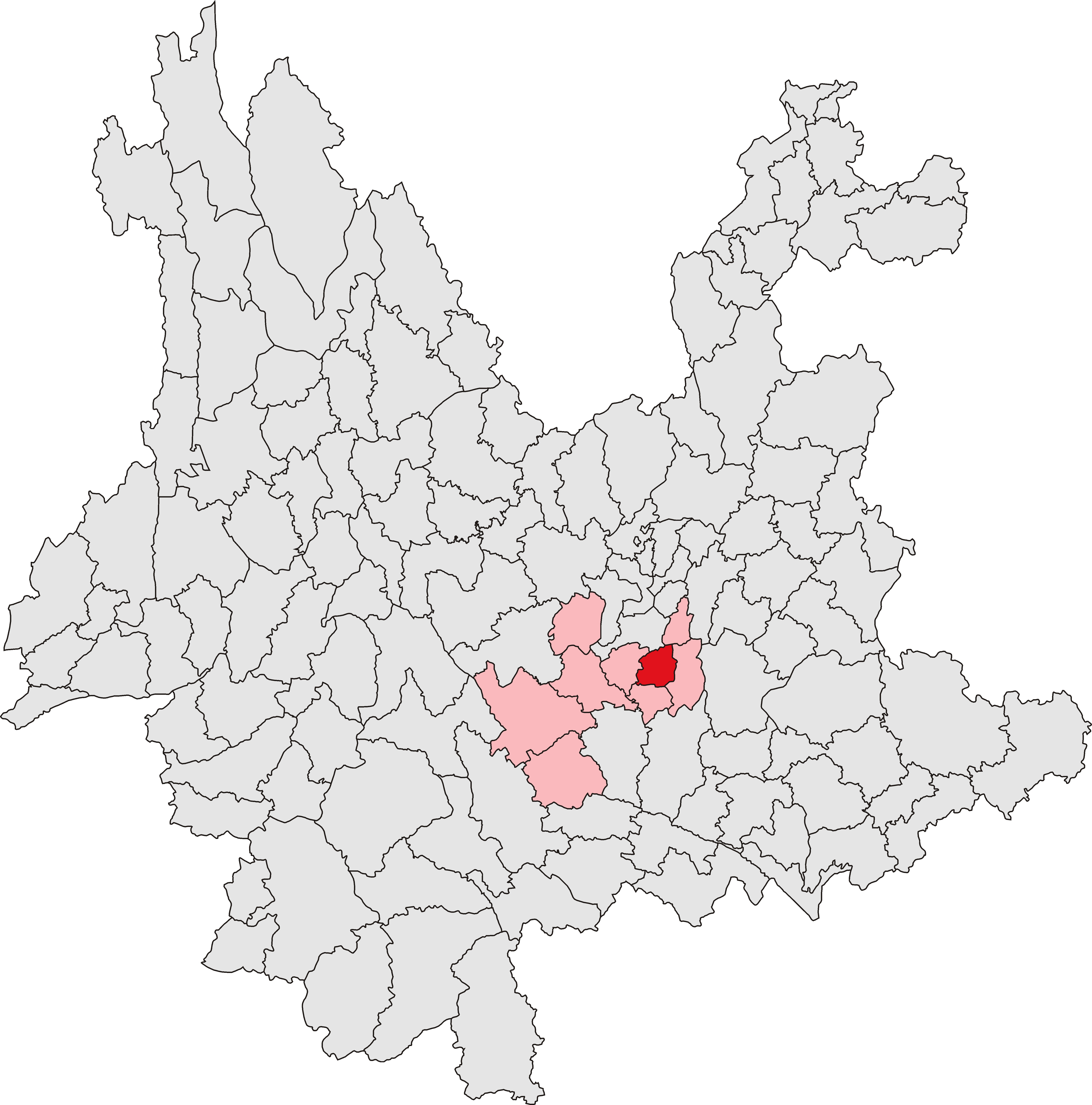 中文（中国大陆）: 江川区位置图